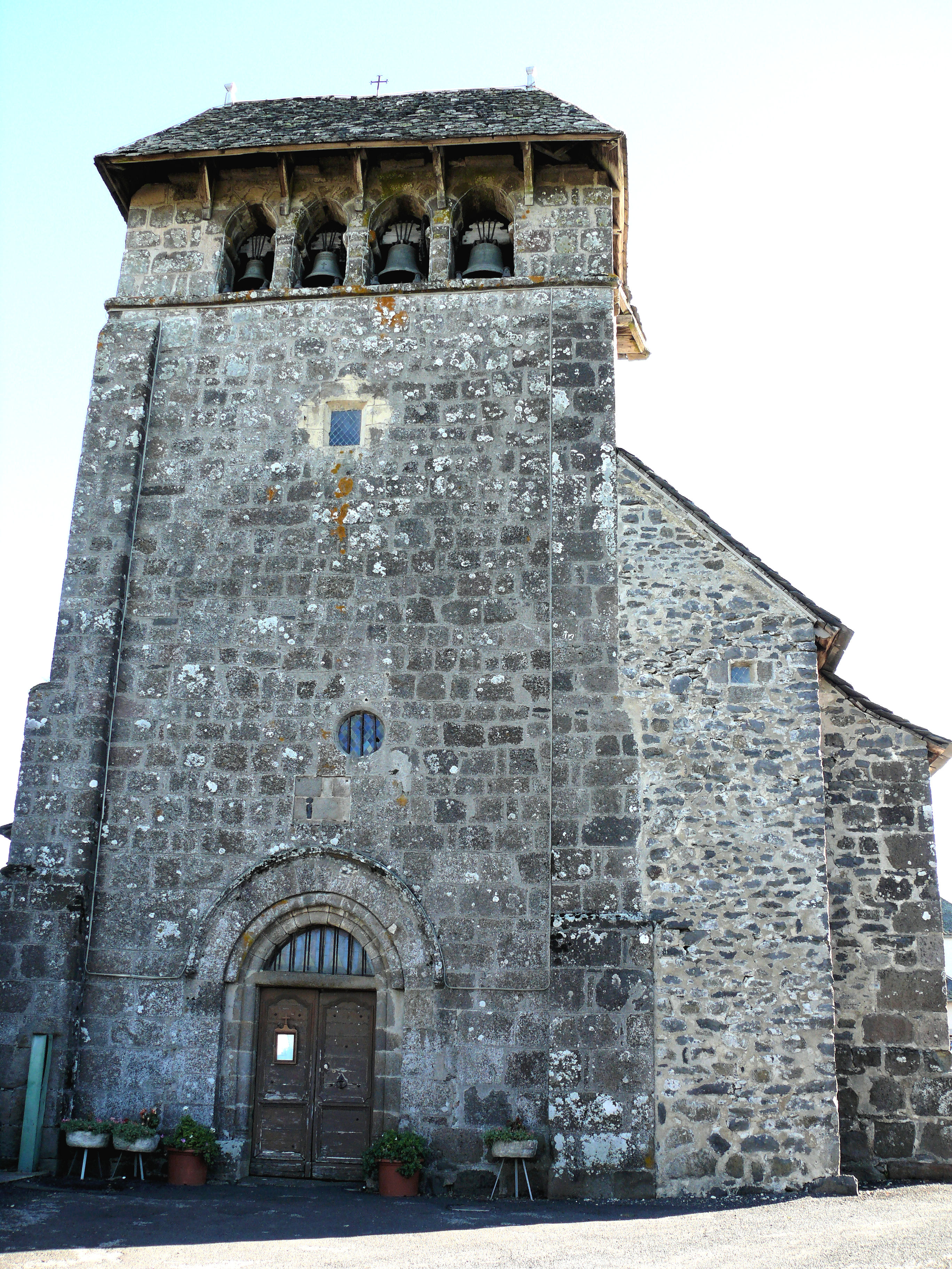 Le Vigean (Cantal) - Eglise Saint-Laurent - Clocher